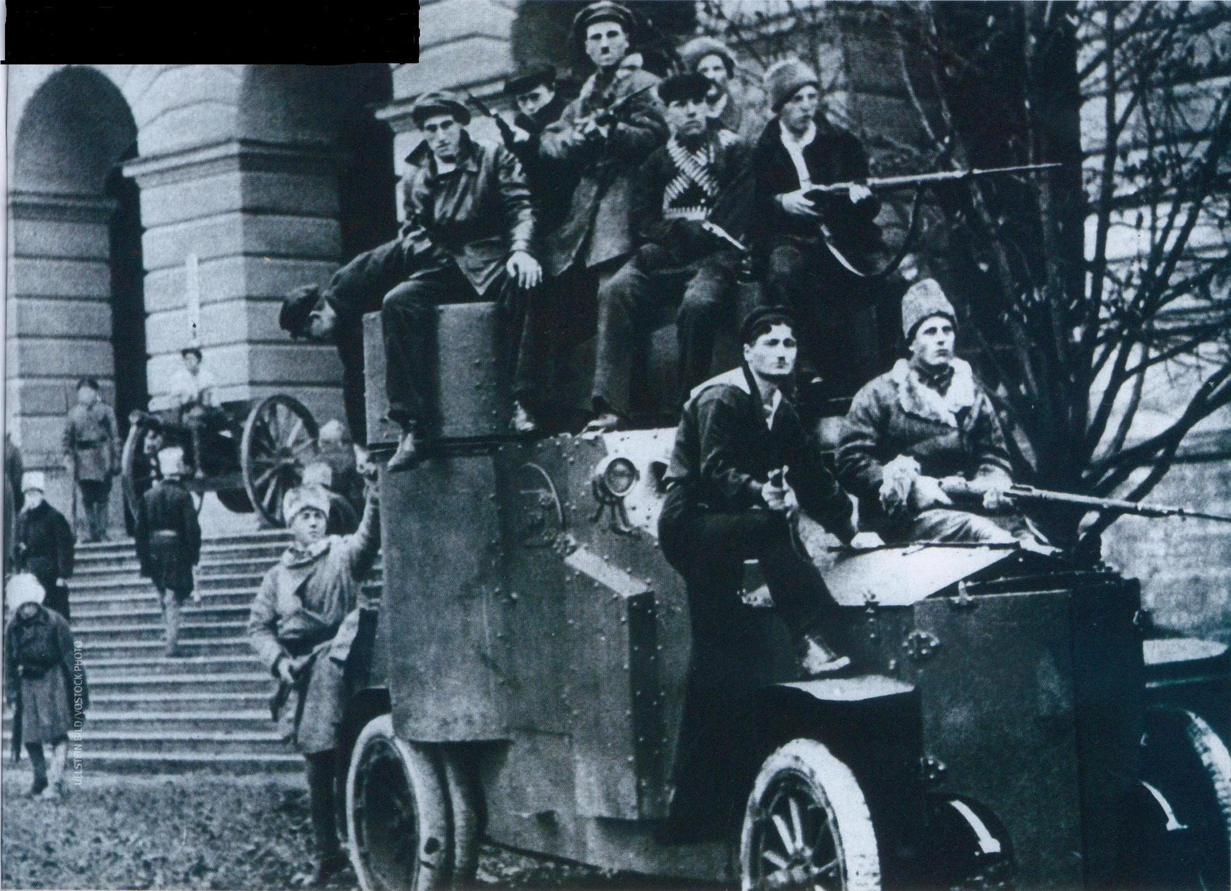 Бронеавтомобиль «Фиат Ижорский» Ижорского завода (на шасси ФИАТ, изготовленном в САСШ на филиале фирмы, бронекузов Ижорского завода) «Илья Муромец» у Смольного института в Петрограде. Самое начало ноября (н.ст.) 1917. С самого утра 25 октября у штаба революции Смольного все кипело. Подъезжали и отъезжали грузовики с красногвадейцами, легковые автомобили и связные мотоциклы. Прямо на тротуарах располагались отряды революционных рабочих, солдат и матросов. Дымили походные кухни. Слева от главного подъезда Смольного, у стены, стояло шесть бронеавтомобилей Запасного автомобильного бронедивизиона. Командование дивизиона сохраняло верность Временному правительству. Но несмотря на это, революционным солдатам удалось вывести 24 октября из гаража шесть броневиков и доставить их к Смольному. Днем 25 октября к Смольному на большой скорости подкатила еще одна, седьмая, боевая машина бронедивизиона "Илья Муромец", которой тоже удалось вырваться из гаража. Это был полугусеничный бронеавтомобиль конструкции Гулькевича. У подразделений, оборонявших Зимний, тоже имелся броневик. Он стоял прямо у центральных ворот здания и держал под прицелом всю Дворцовую площадь. Правда, он был не на ходу и мог использоваться только как неподвижная пулеметная точка. Л.Д. Глаголев. "Бронемашины", М: Издательство ДОСААФ, 1986. То есть или это не "Илья Муромец", или Глаголев не прав.